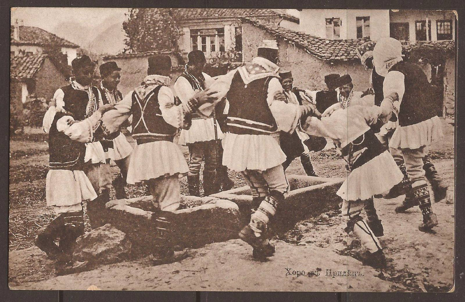 Мажи играат оро во Прилеп. Снимено пред втората светска Војна